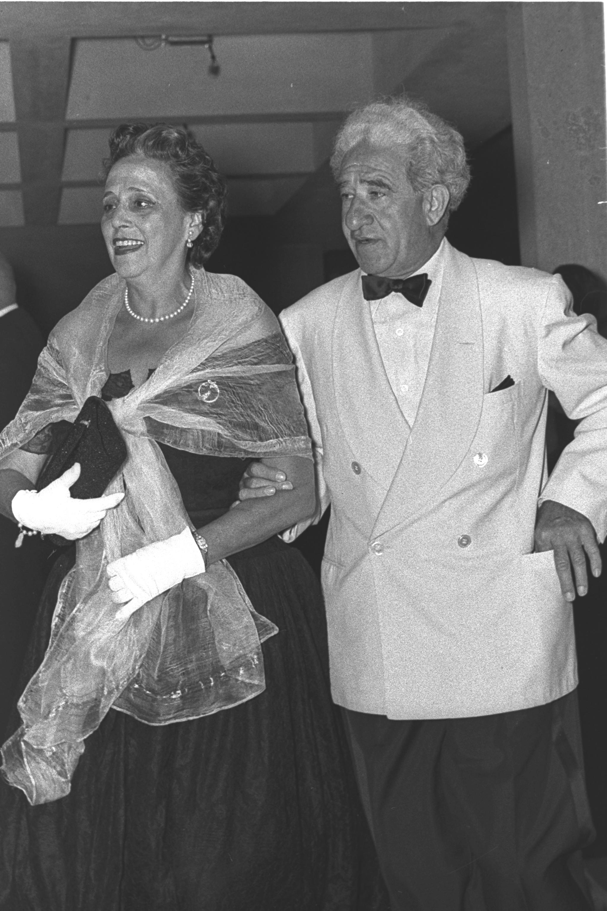 מאיר וייסגל ואשתו בקונצרט הפתיחה החגיגי של היכל התרבות בתל אביב